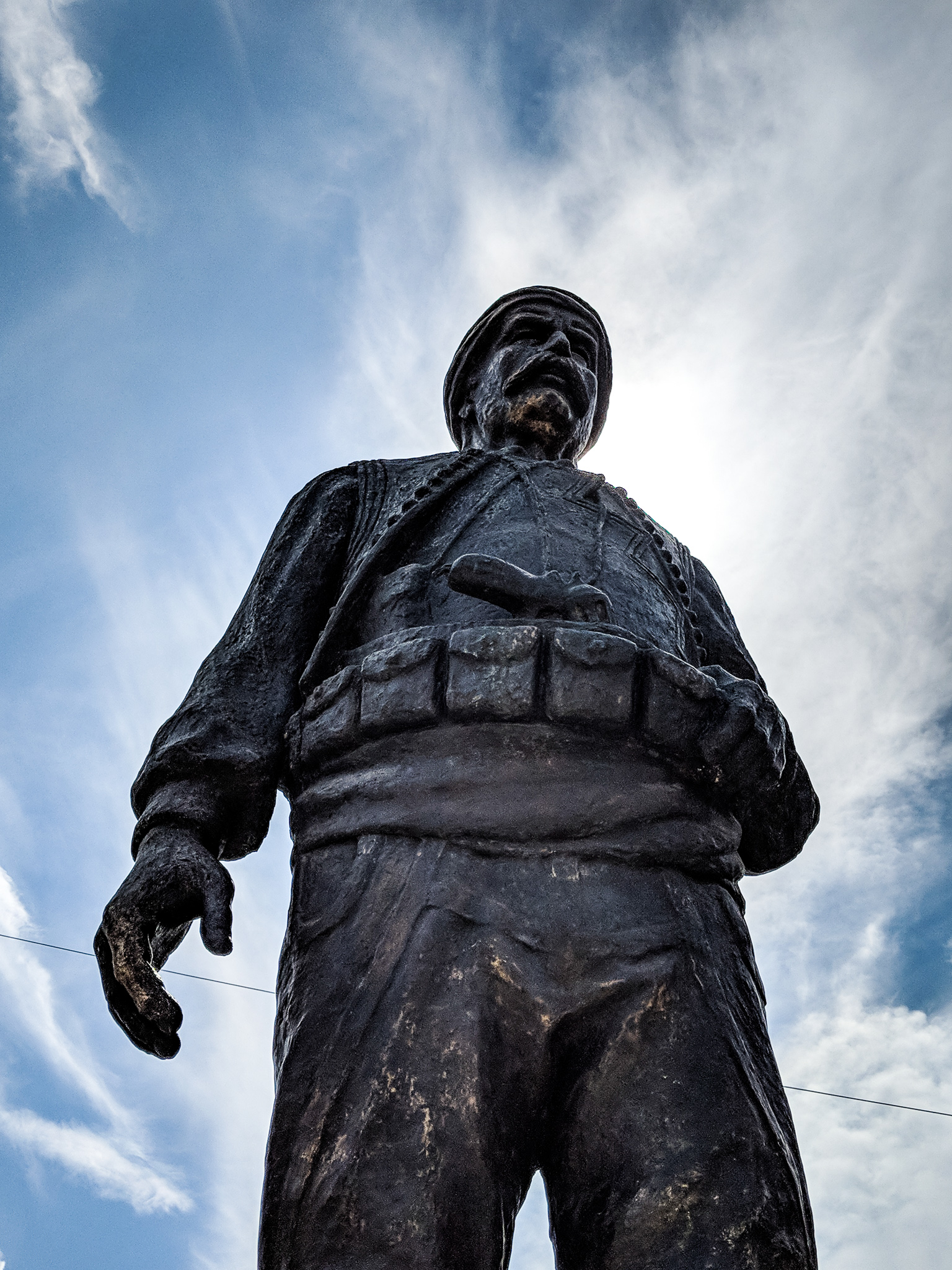 Statuja e Idriz Seferit, Gjilan